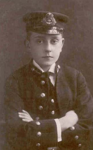 George Mountbatten (1892-1938)